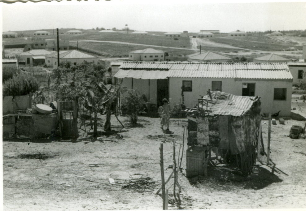 צריף בנווה עמל מהבנייה המוקמת באדיבות ארכיון בית ראשונים הרצליה